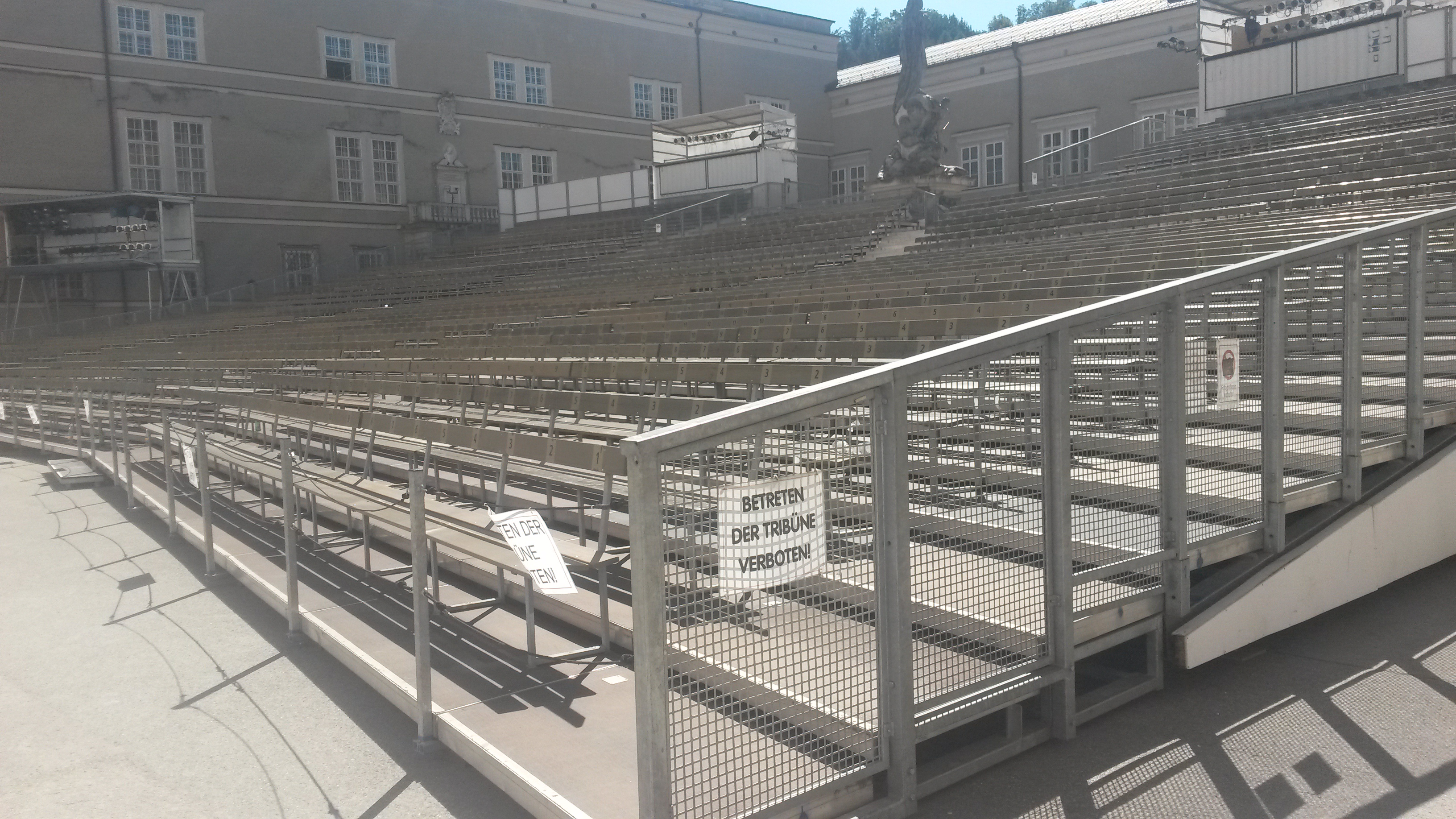 Domplatz im August 2015